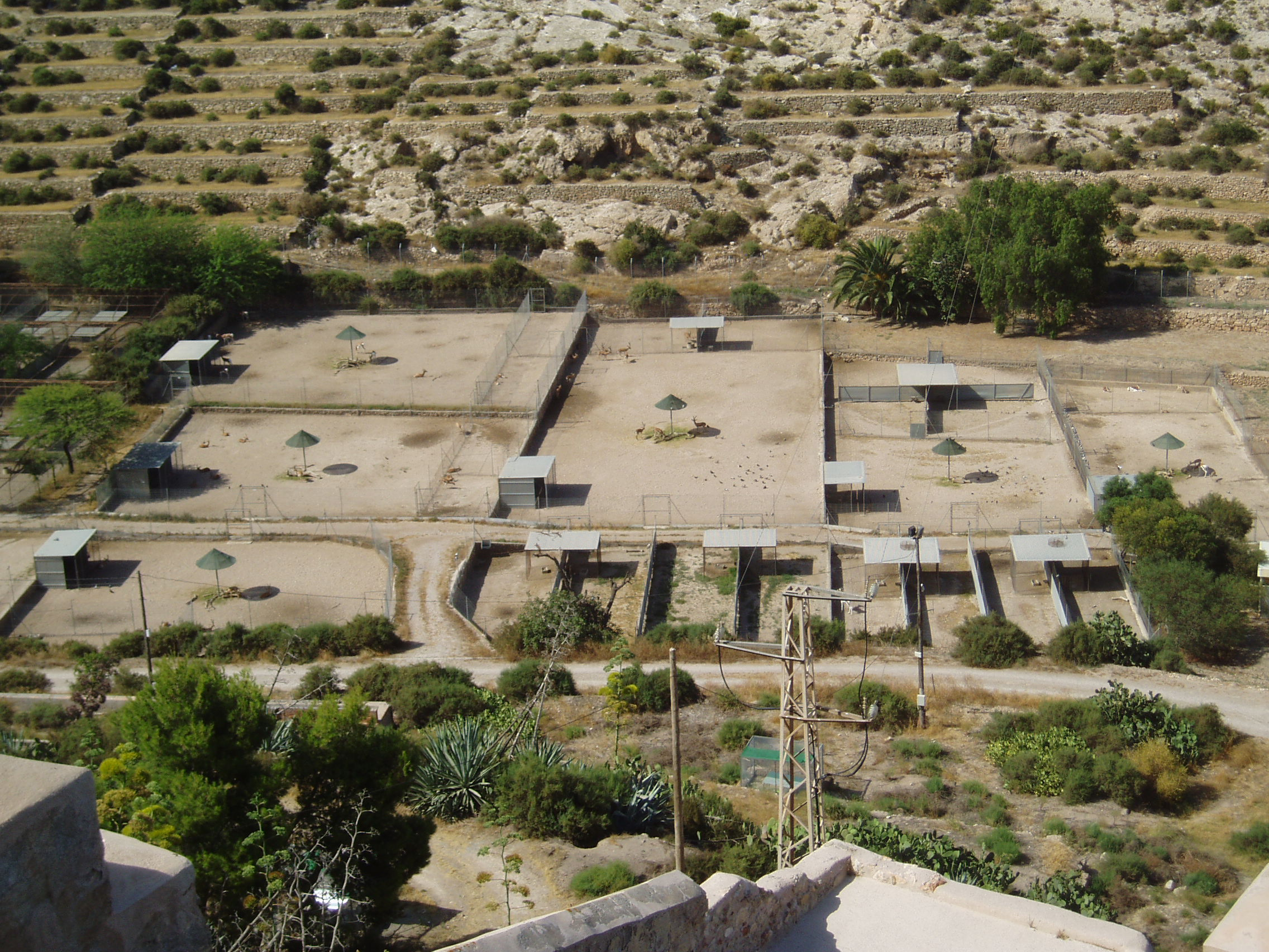 Finca La Hoya en Almeria, España, vista desde la alcazaba almeriense. En ella se encuentra el Parque de Rescate de la Fauna Sahariana, perteneciente al CSIC.